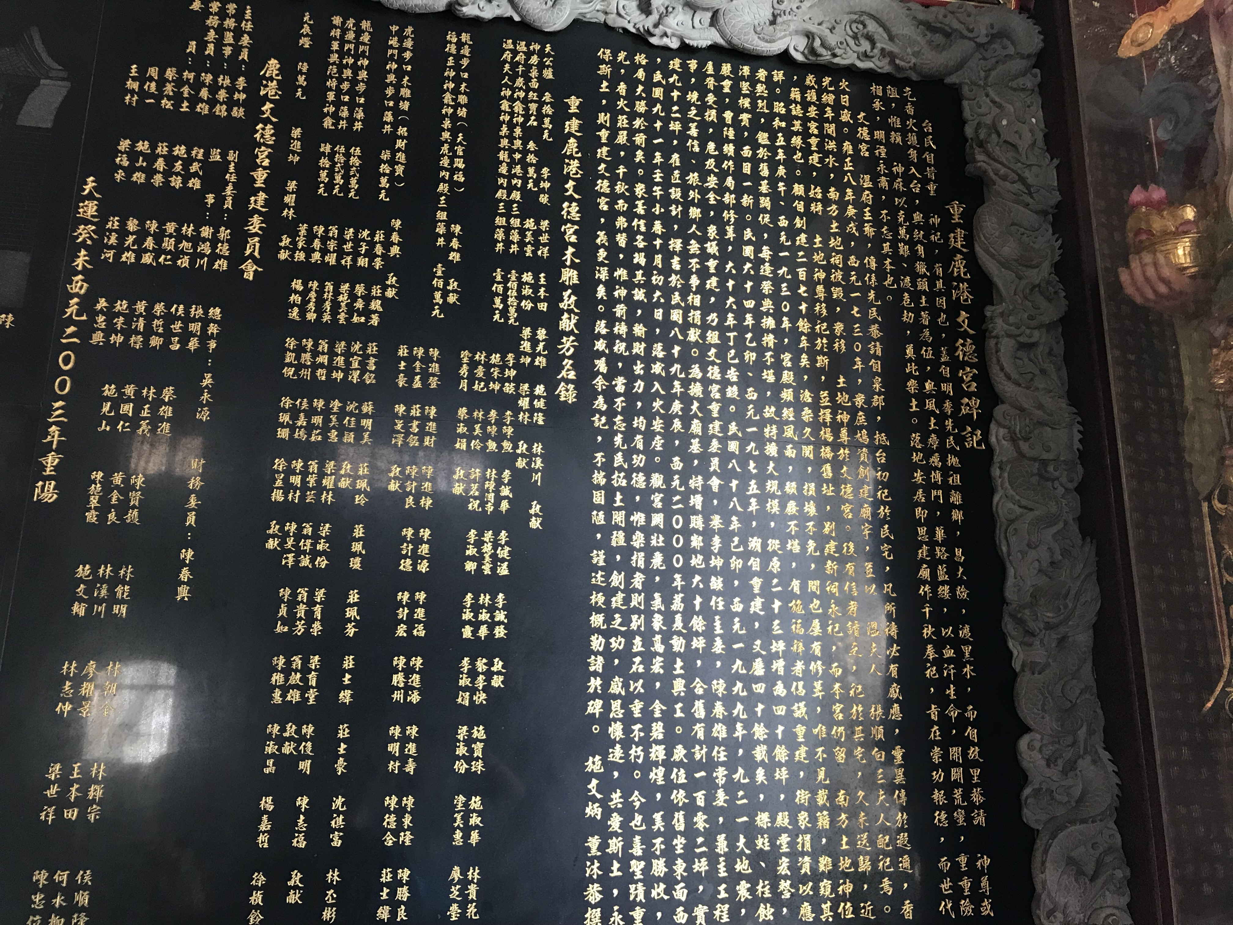 鹿港文德宮沿革